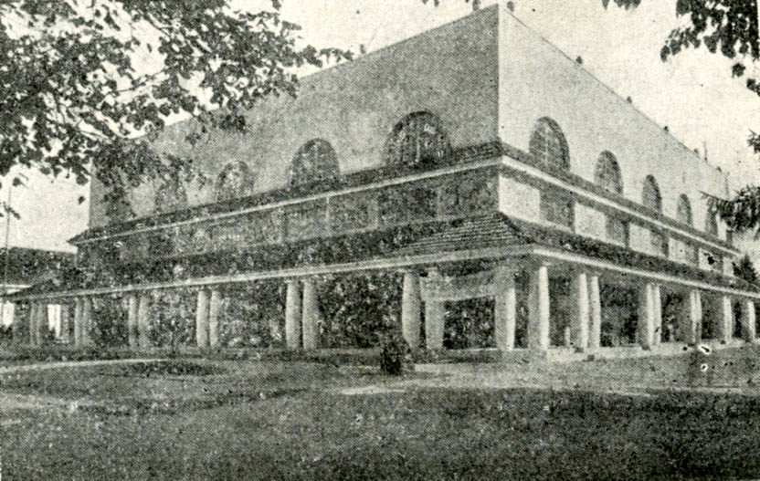 Павільйон Східних торгів у Львові. Архітектор Євген Червінський (1887—1930).